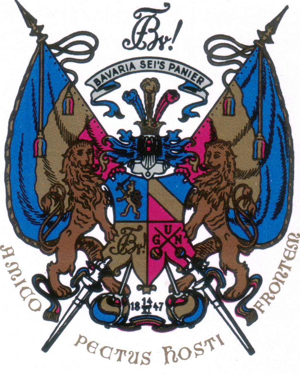 Vollwappen des Corps Bavaria zu Karlsruhe